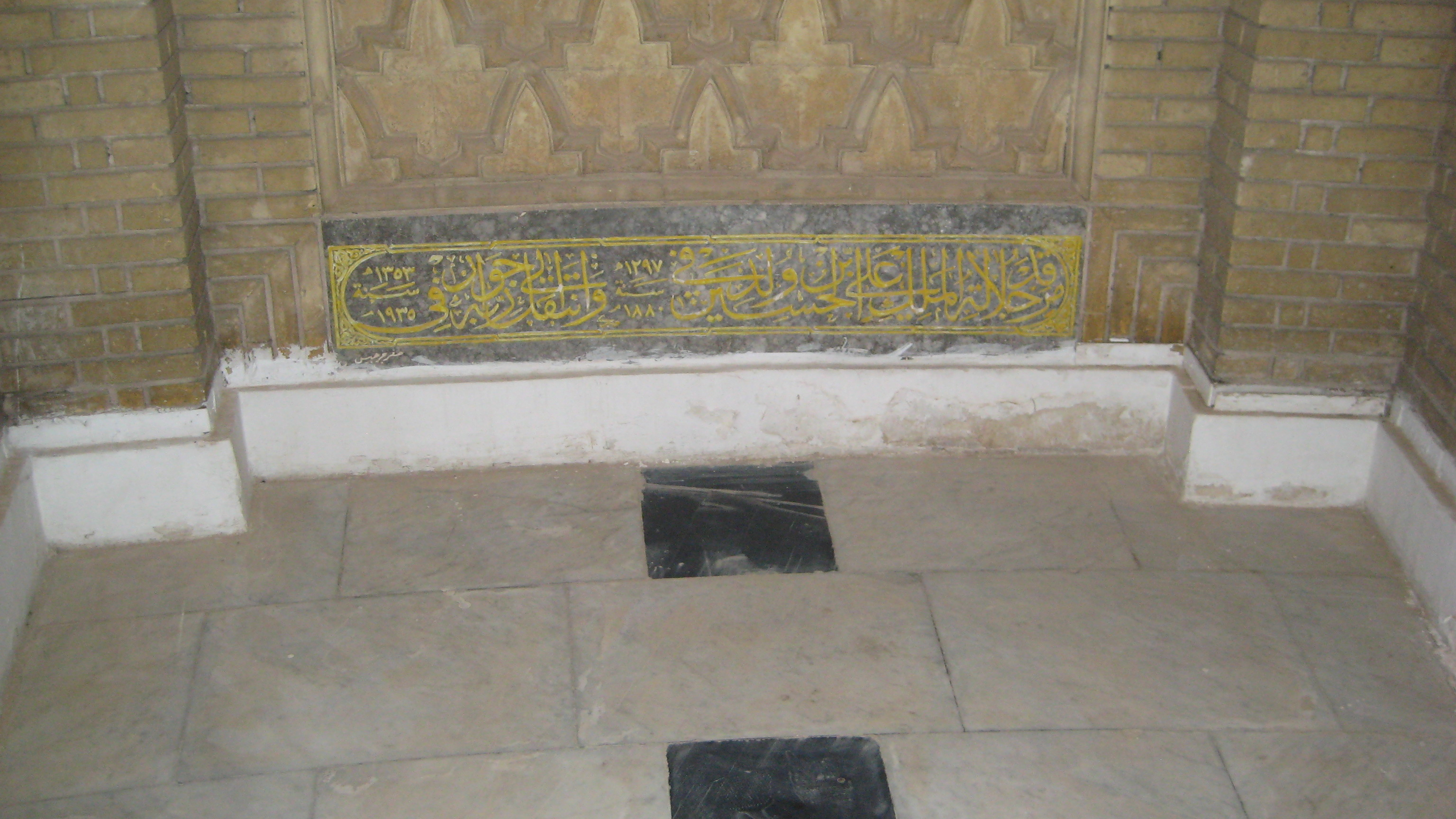 قبر الملك علي بن الحسين ( ملك الحجاز ) 1880- 1935 الواقع في حي الأعظمية في بغداد